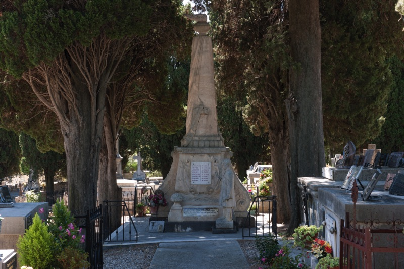 Monument aux morts - Archives départementales de l’Hérault - FRAD034-2458W-Peret-00001